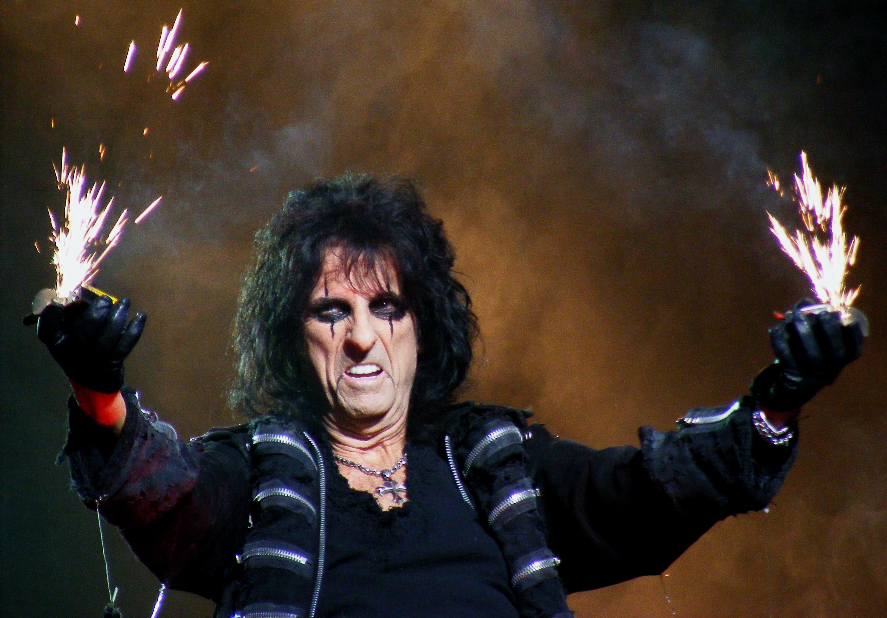 Emiliàn e rumagnòl: Alice Cooper dal viv a 'l Apollo Theatre ad Manchester, in dla Dméndga dal 30 'd Utóbar dal 2011